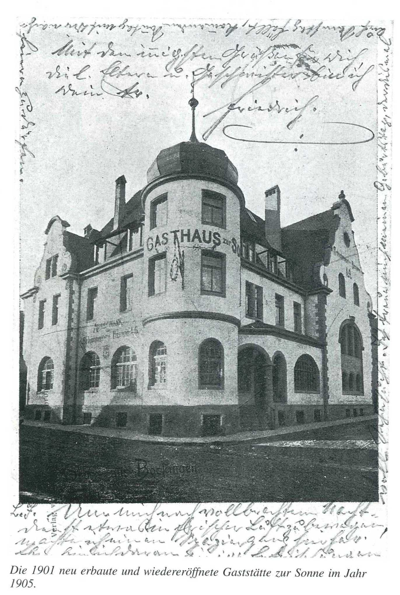 Heilbronn Böckingen Gasthaus zur Sonne 1905